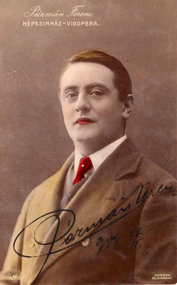 Pázmán Ferenc (Bécs, 1873. szeptember 24. – Budapest, 1965. január 11.) magyar színművész, bariton énekes. Fényképes levelezőlap. Névaláírás és dátum a képes oldalon: Pázmán Ferenc 1908. II. 17